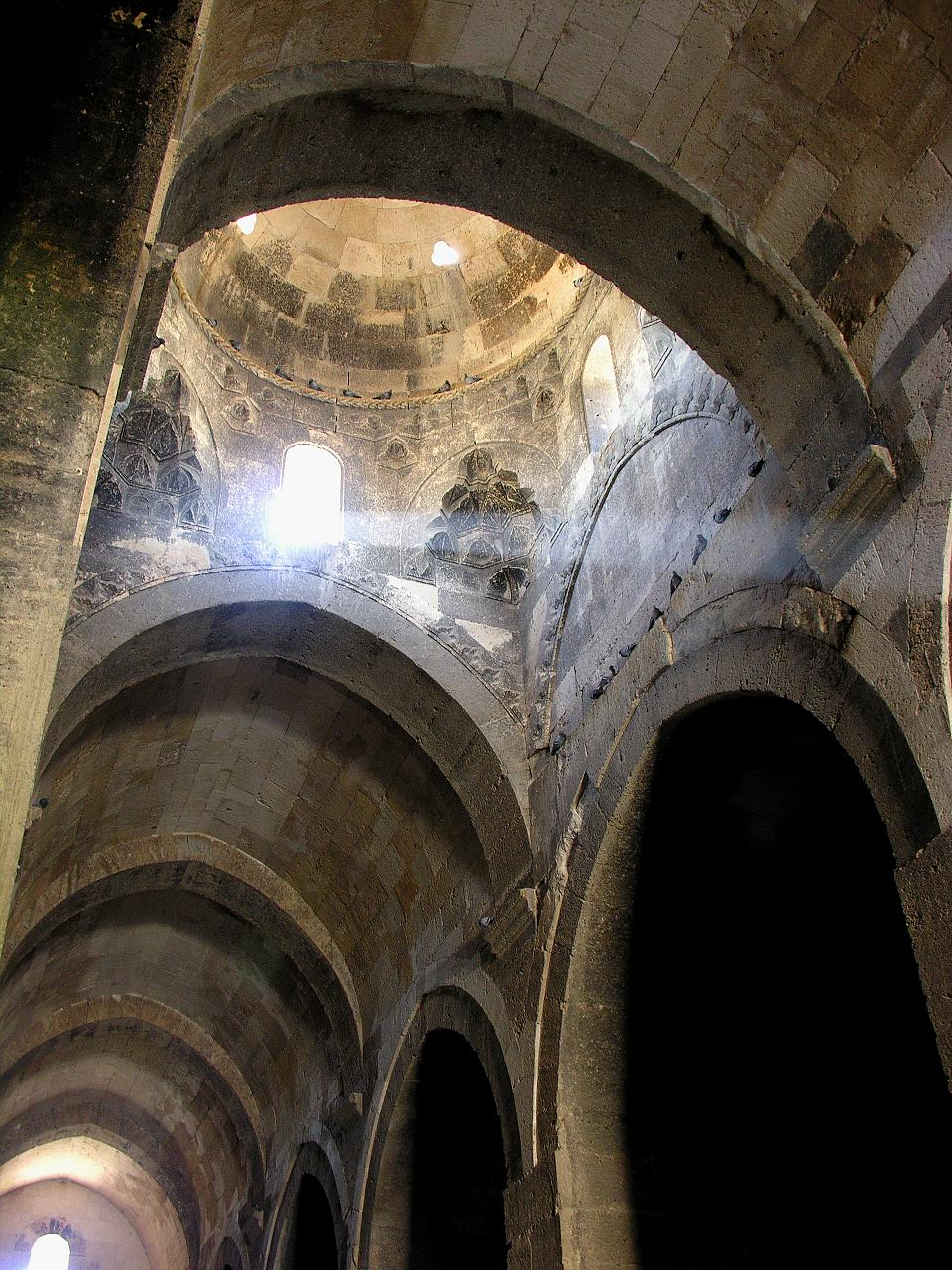 Turkey-2200